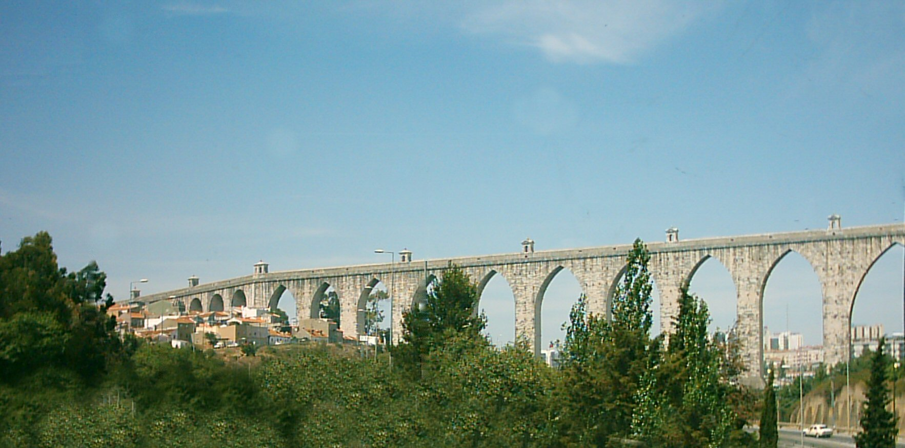 Acueducto de las Aguas Libres Aqueduto das Águas Livres em Lisboa, Portugal